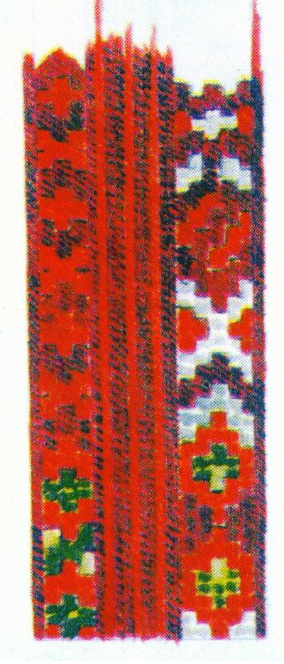 Фриза с кръстчета, везани върху ръкава на горна дреха - носия от Галичник, Дебърско; кръстчетата са равнокрилни; копирани в естествената си величина през април 1914 г. в гр. София.